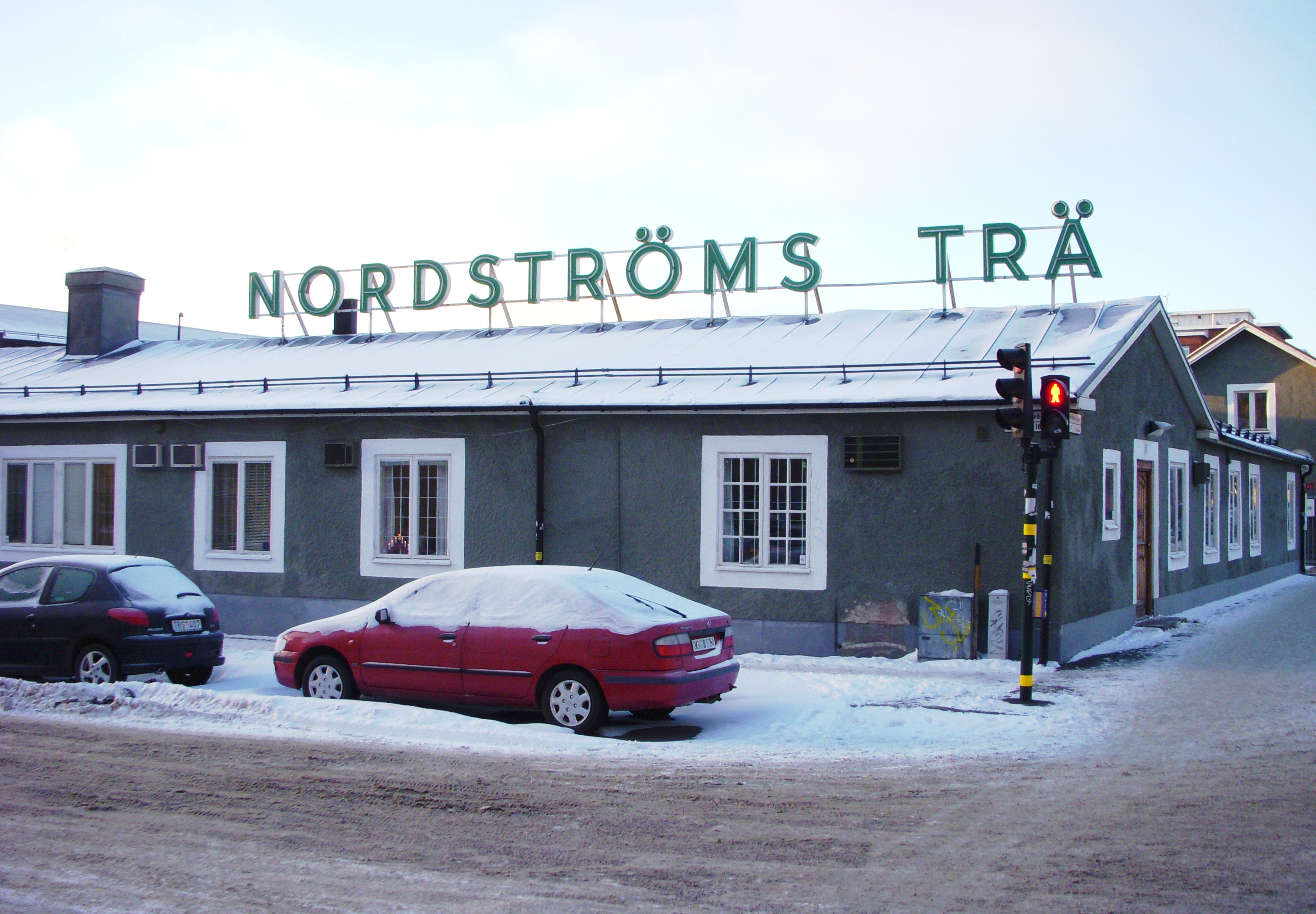 Nordströms trä på Lövholmen (Liljeholmen)